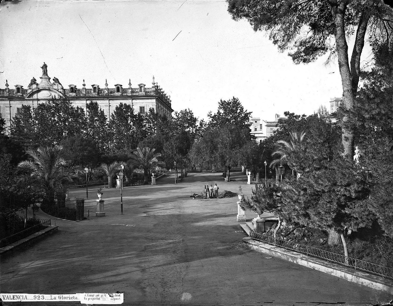 La Gloreita, València, 1870. Foto de Juan Laurent